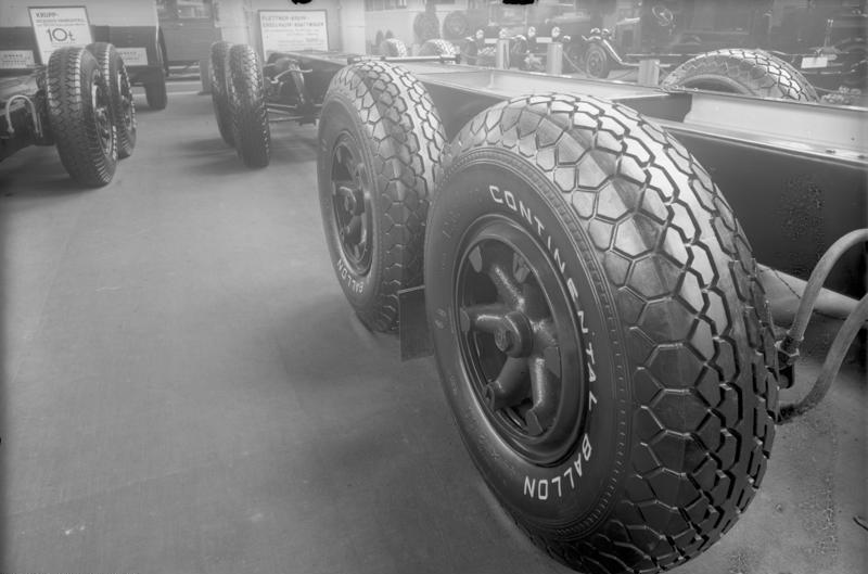 Die Eröffnung der grossen Automobilausstellung in den Ausstellungshallen am Kaiserdamm in Berlin! Die gewaltigen Räder des Flettner-Krupp-Grosskraftwagens, des grössten deutschen Lastkraftwagens, welcher 15 to. Nutzlast trägt und 14 m lang ist. Dieser Riese wird von einem 150 P.S.-Motor angetrieben.